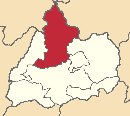 Mapa localizador del cantón en Cotopaxi, Ecuador